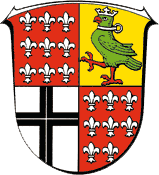 Wappen von Eiterfeld